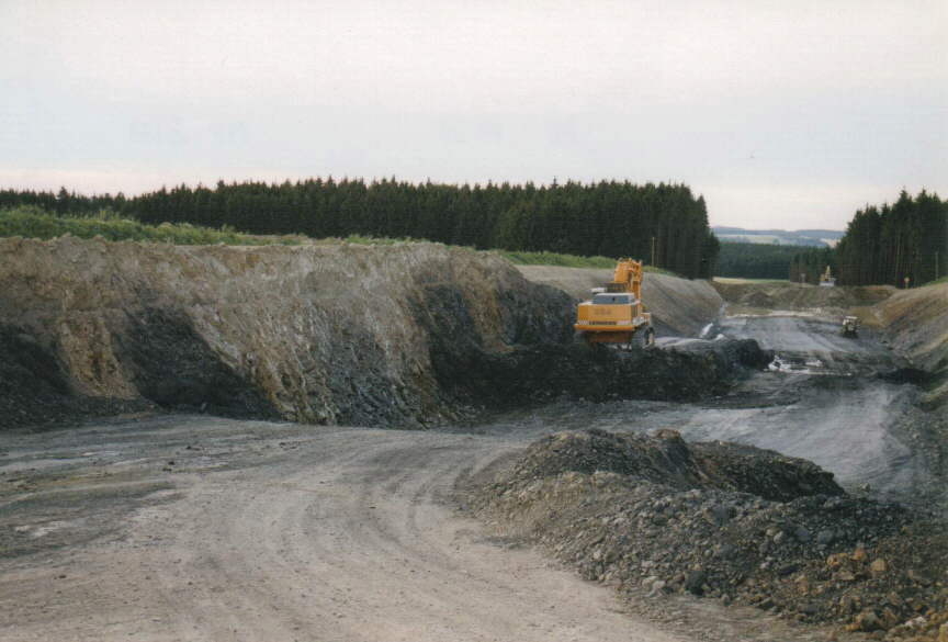 Baustelle der A 93 bei Hof (de:1999). Blick in Richtung Norden. Aufnahme: Steffen Mokosch